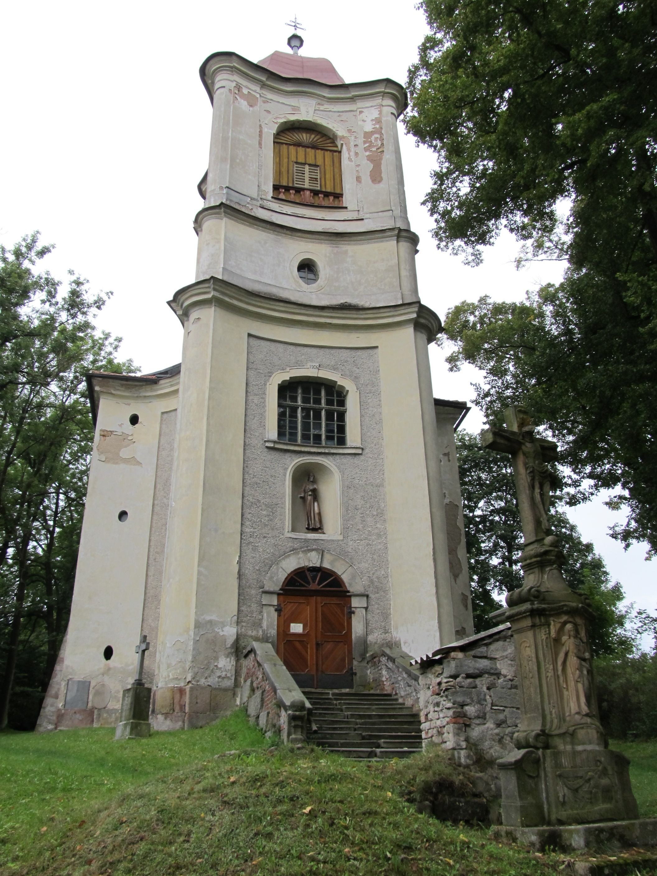 Kostel sv. Josefa Pěstouna (Stárkov), Stárkov